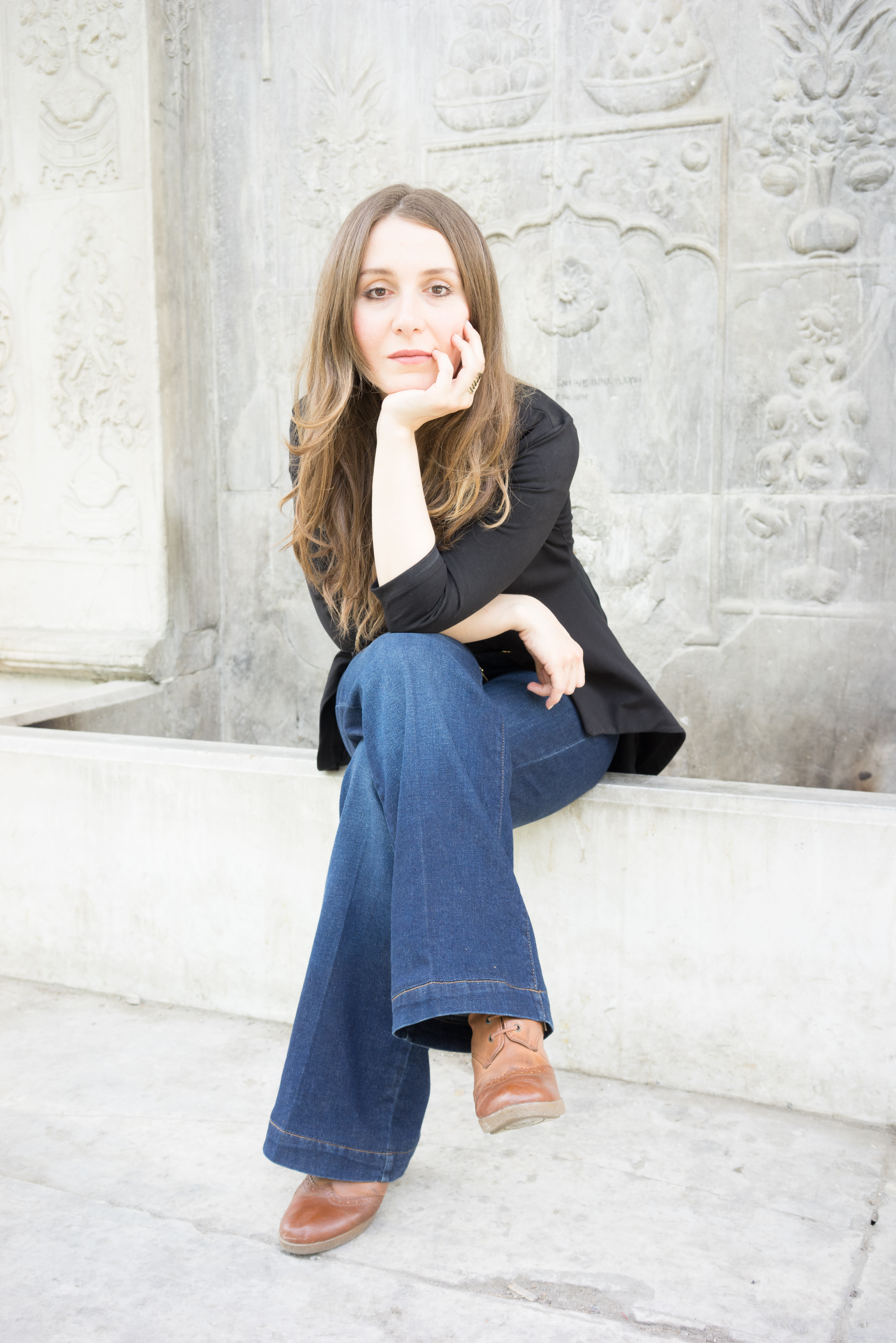 Gözde Kurt Fotoğraf